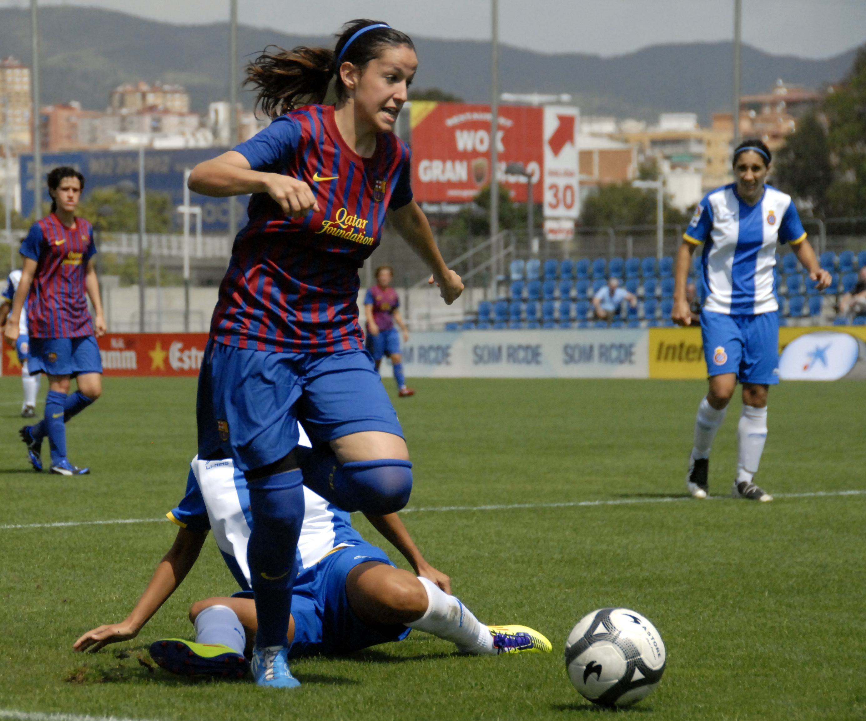 escenes de la final.